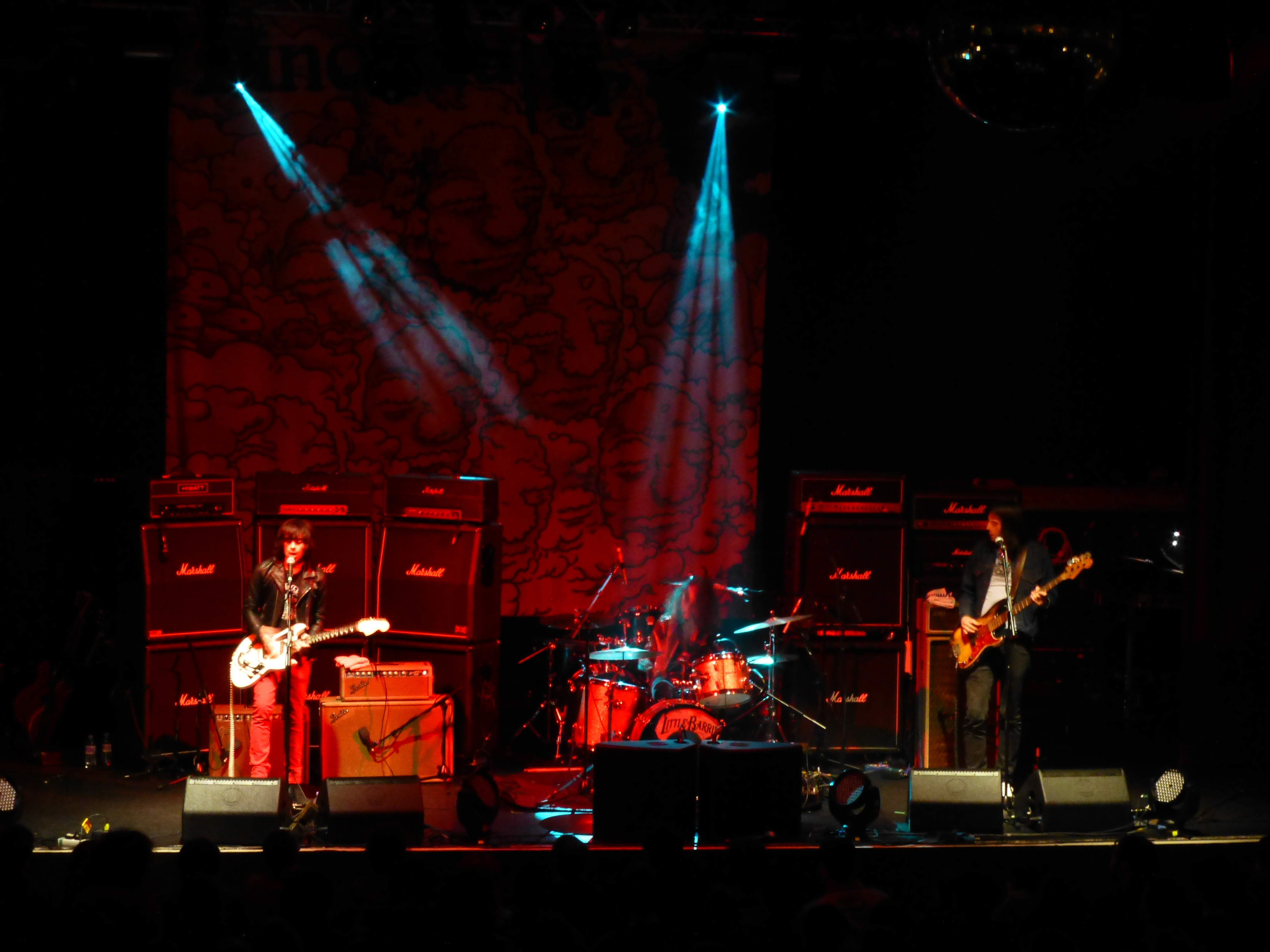 Little Barrie @ The Ritz, Manchester 1-2-2013 (supporting Dinosaur Jr.)